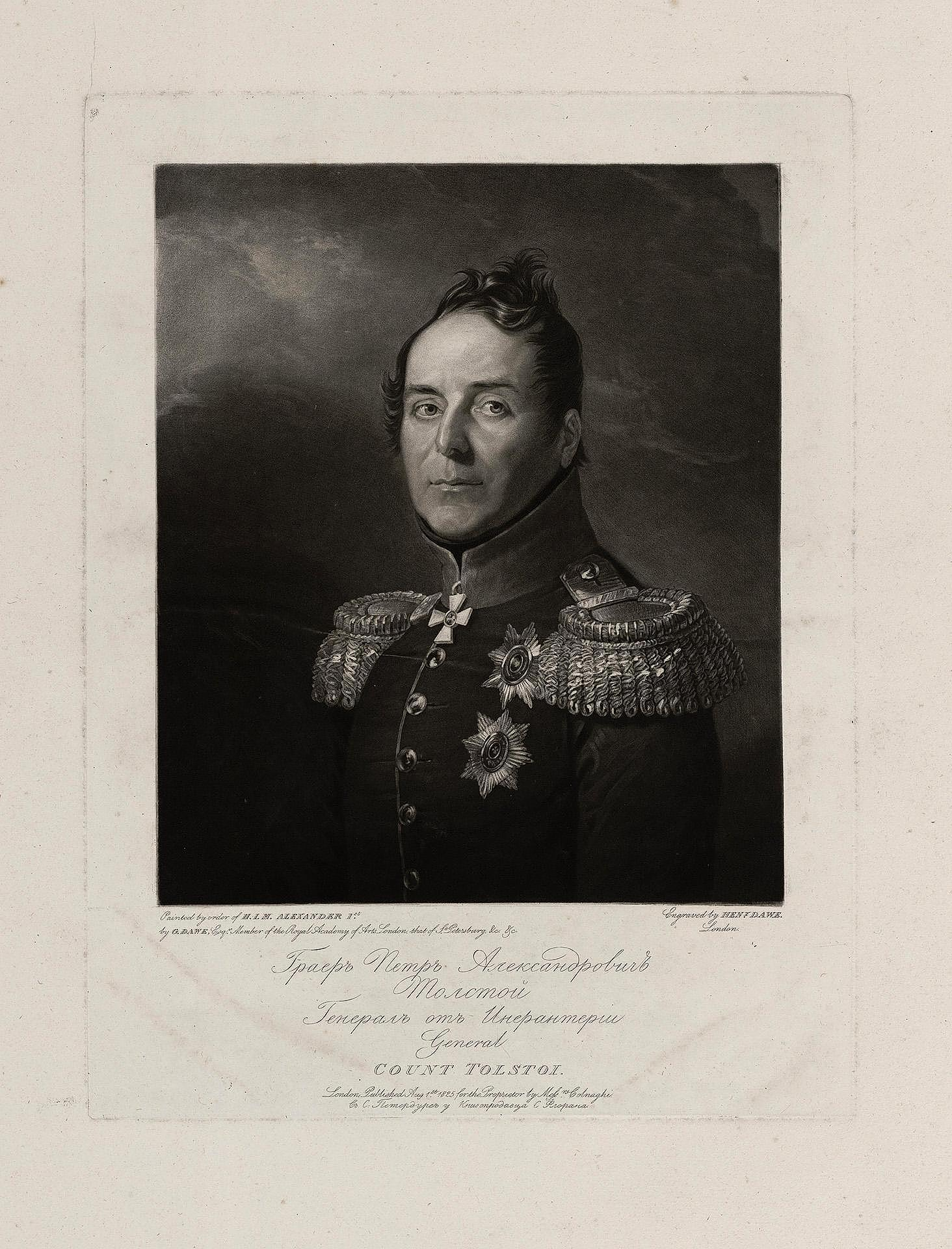 Портрет генерала П. А. Толстого